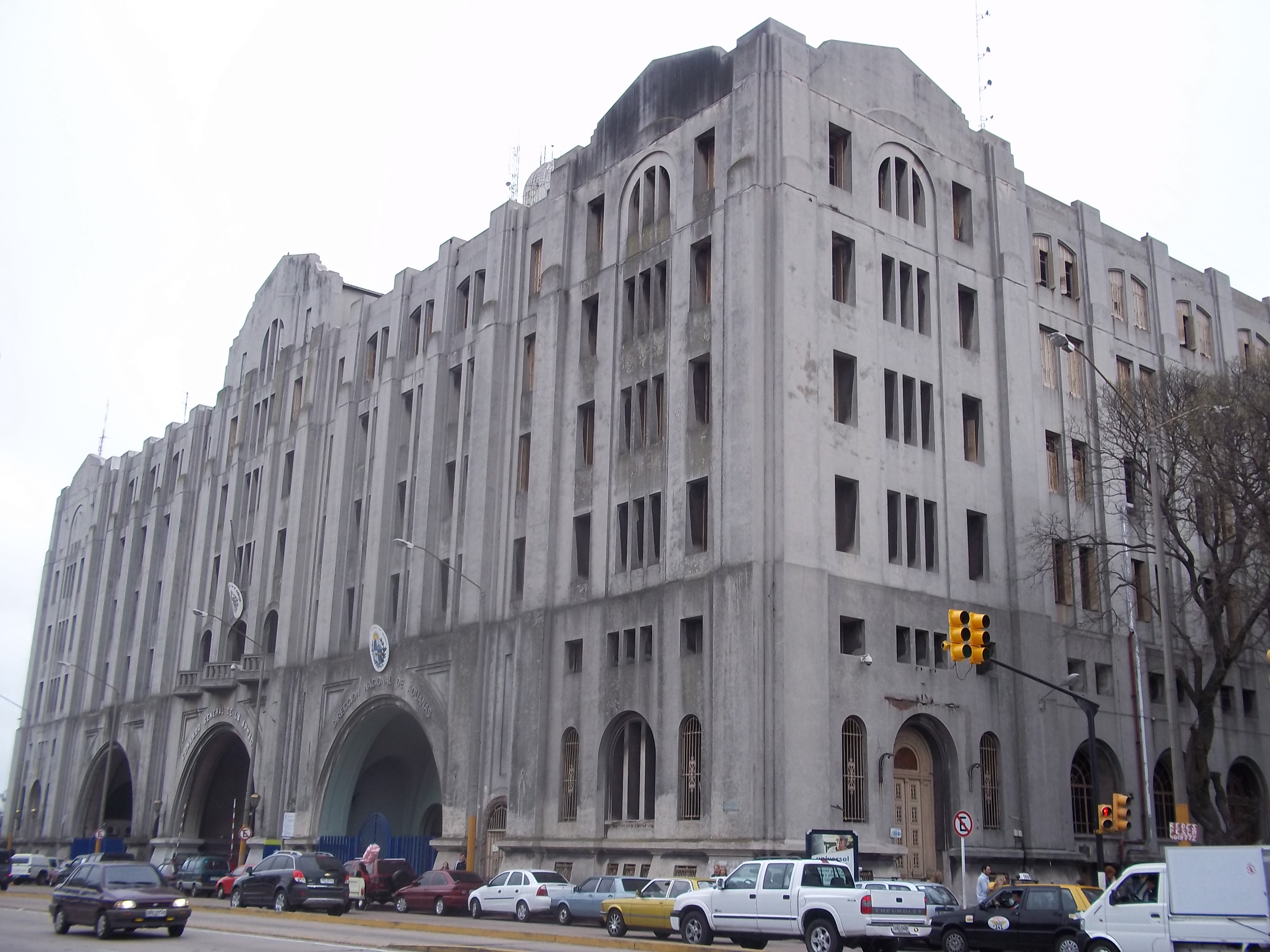 Edificio en la que se ubican la Dirección Nacional de Aduanas (a la izquierda de la imagen), el Comando General de la Armada (al centro) y la Prefectura Nacional Naval (ahora subunidad de la Armada, del lado derecho). Aduana, Montevideo, Uruguay.